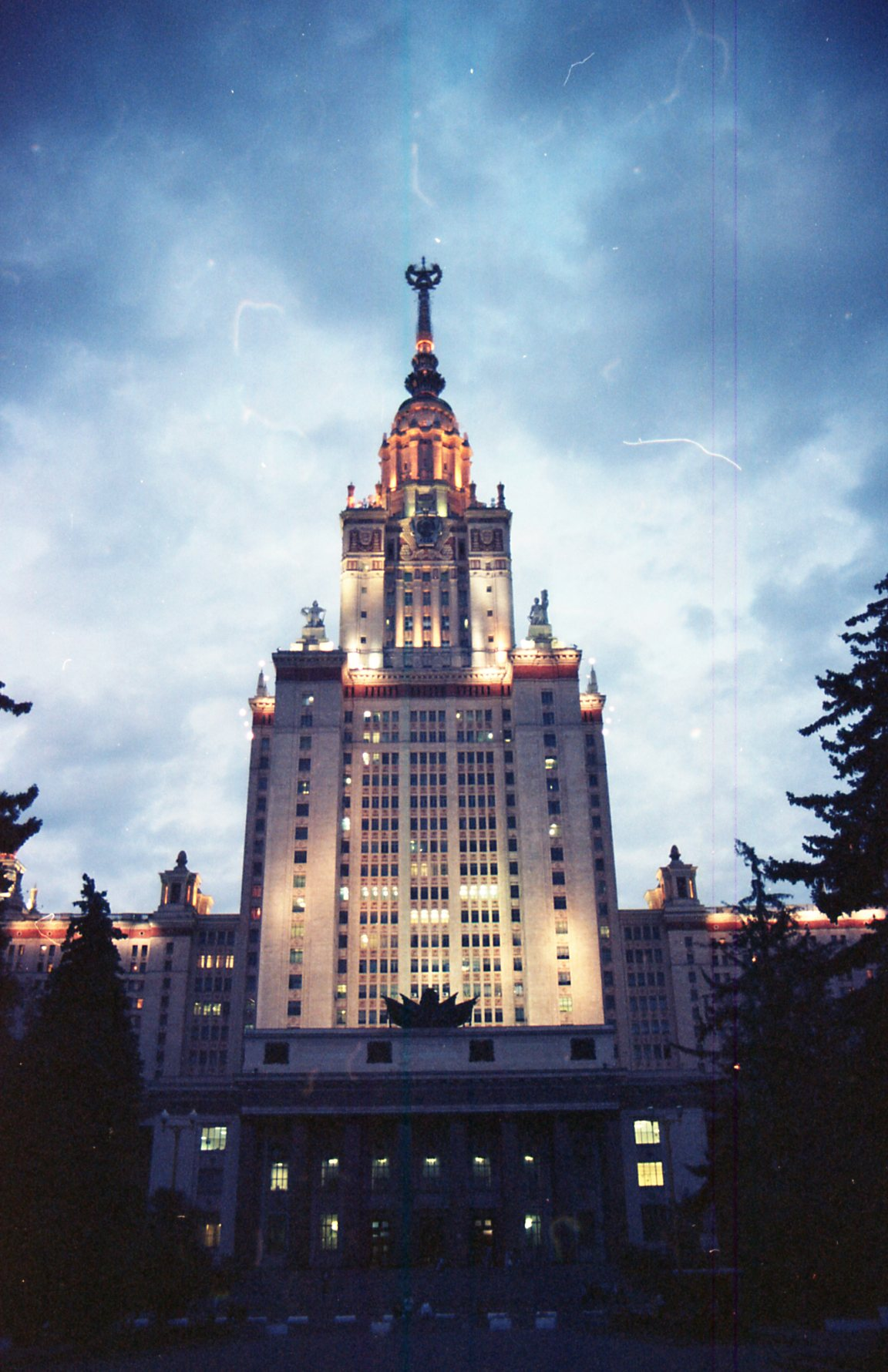 Torre principale del complesso universitario vista di sera